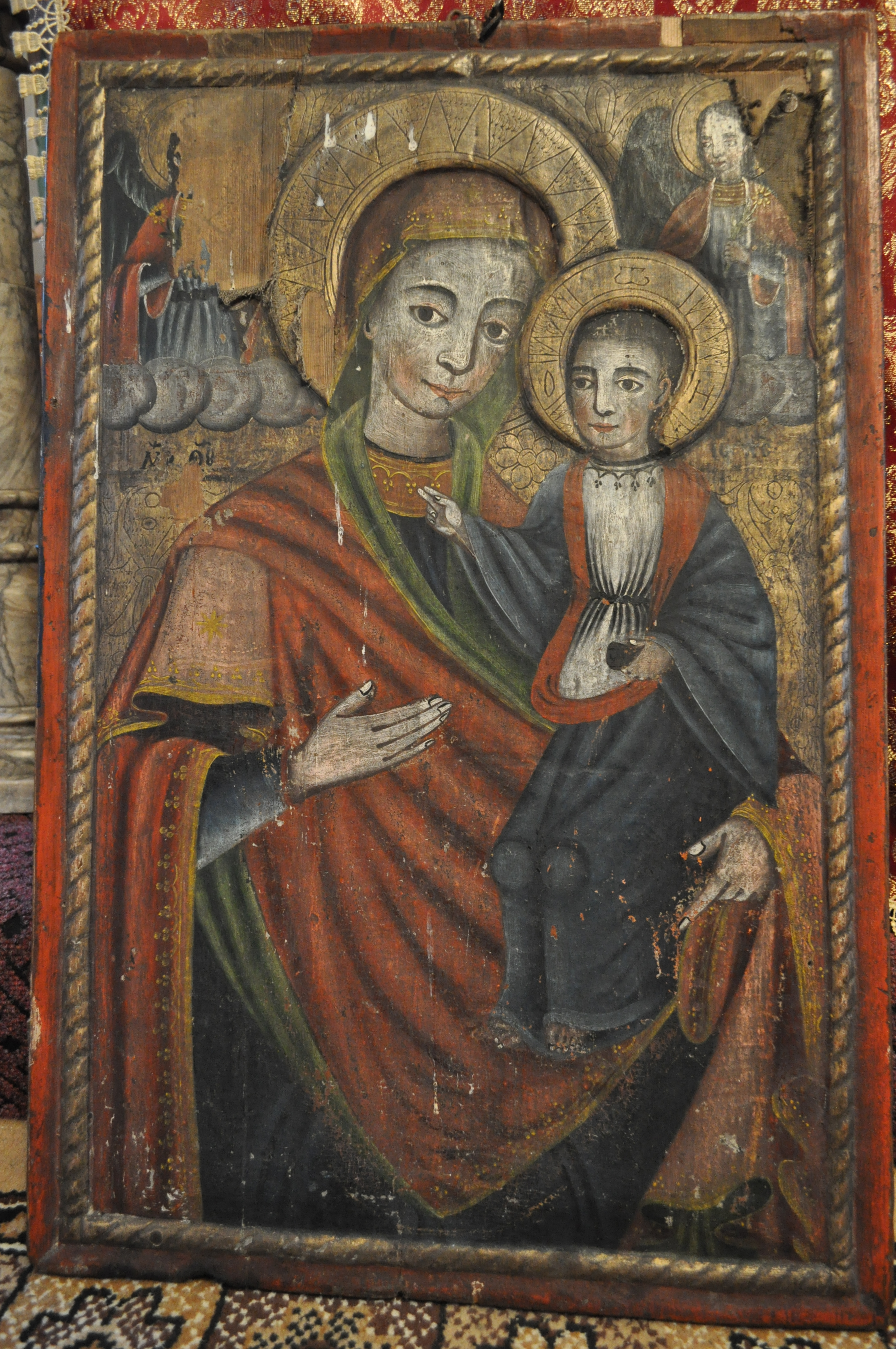 Biserica de lemn "Sfântul Petru" din Mureșenii de Câmpie